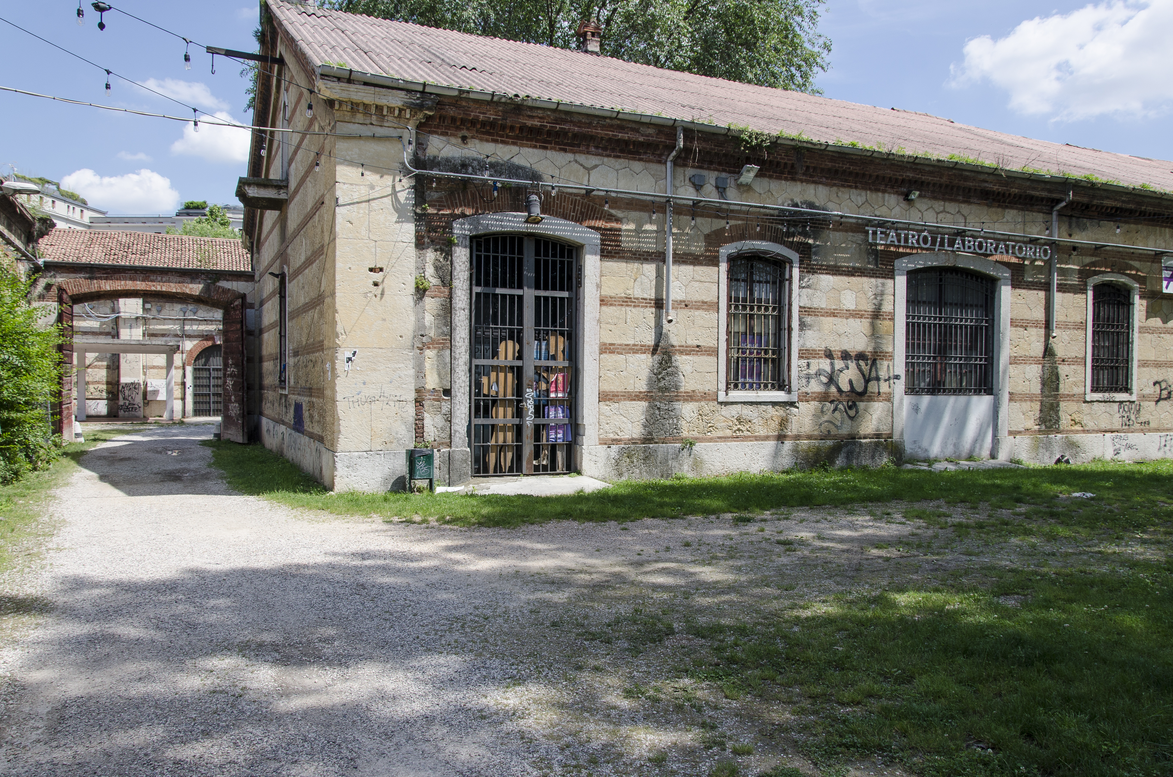 Arsenale di Verona